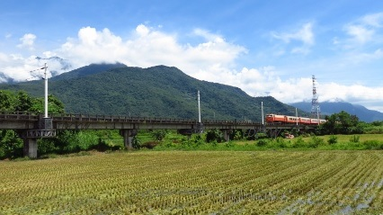 台鐵花東線木瓜溪避溢橋 was filmed by TDCKW on 20200704